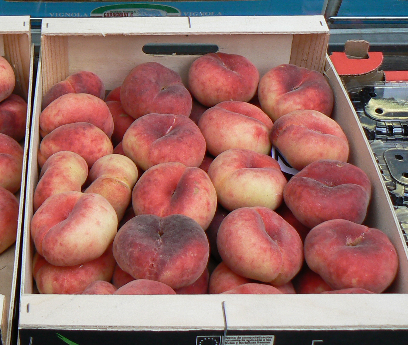 Una cassetta di un fruttivendolo espone la varietà di pesche dette "tabacchiera", "saturnina" o "platicarpa". Foto scattata a Morgex, Valle d'Aosta, Italia.